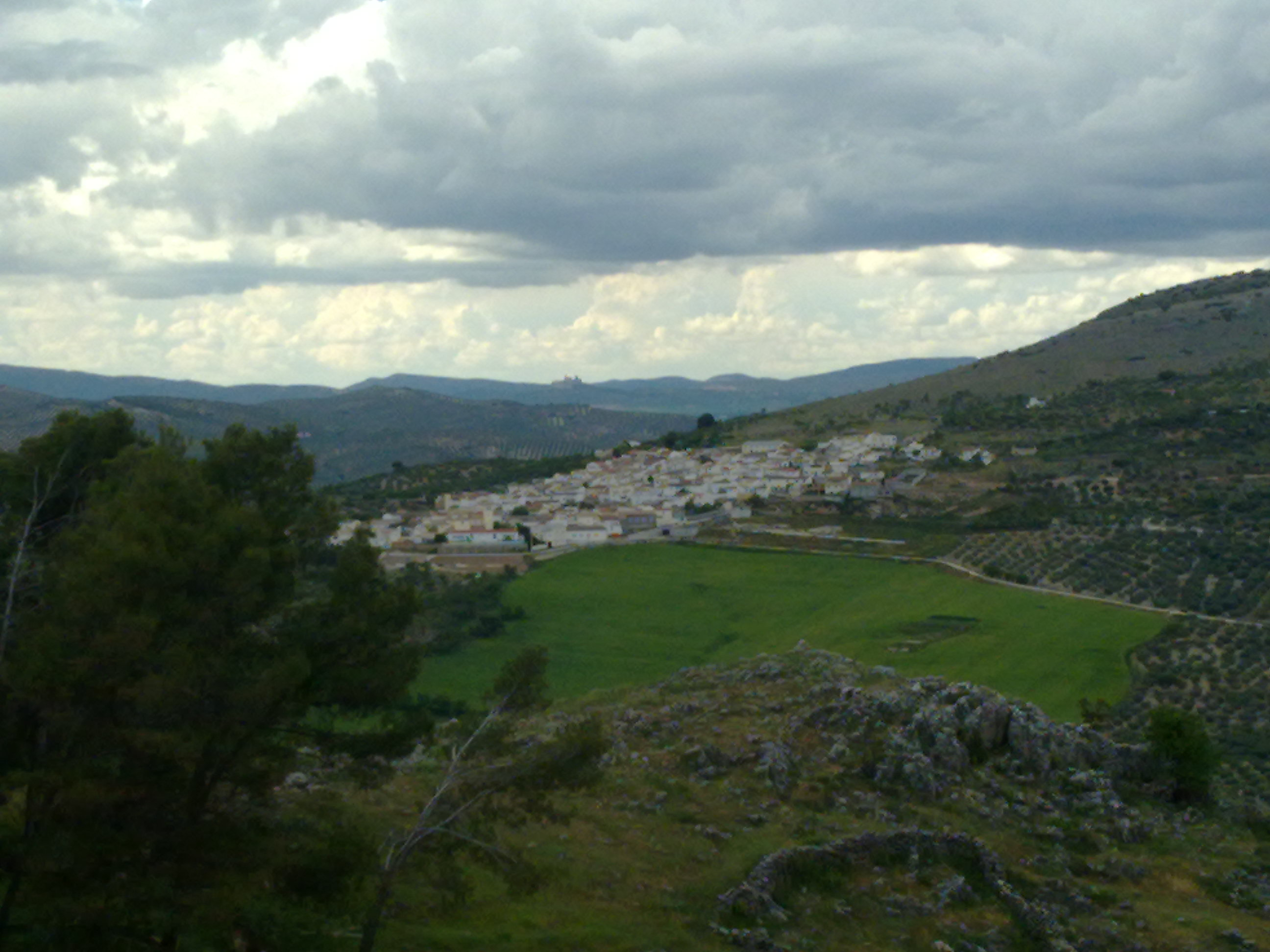 Una vista panorámica de la localidad española de Tózar (municipio de Moclín, Granada), desde la Sierra del Marqués.